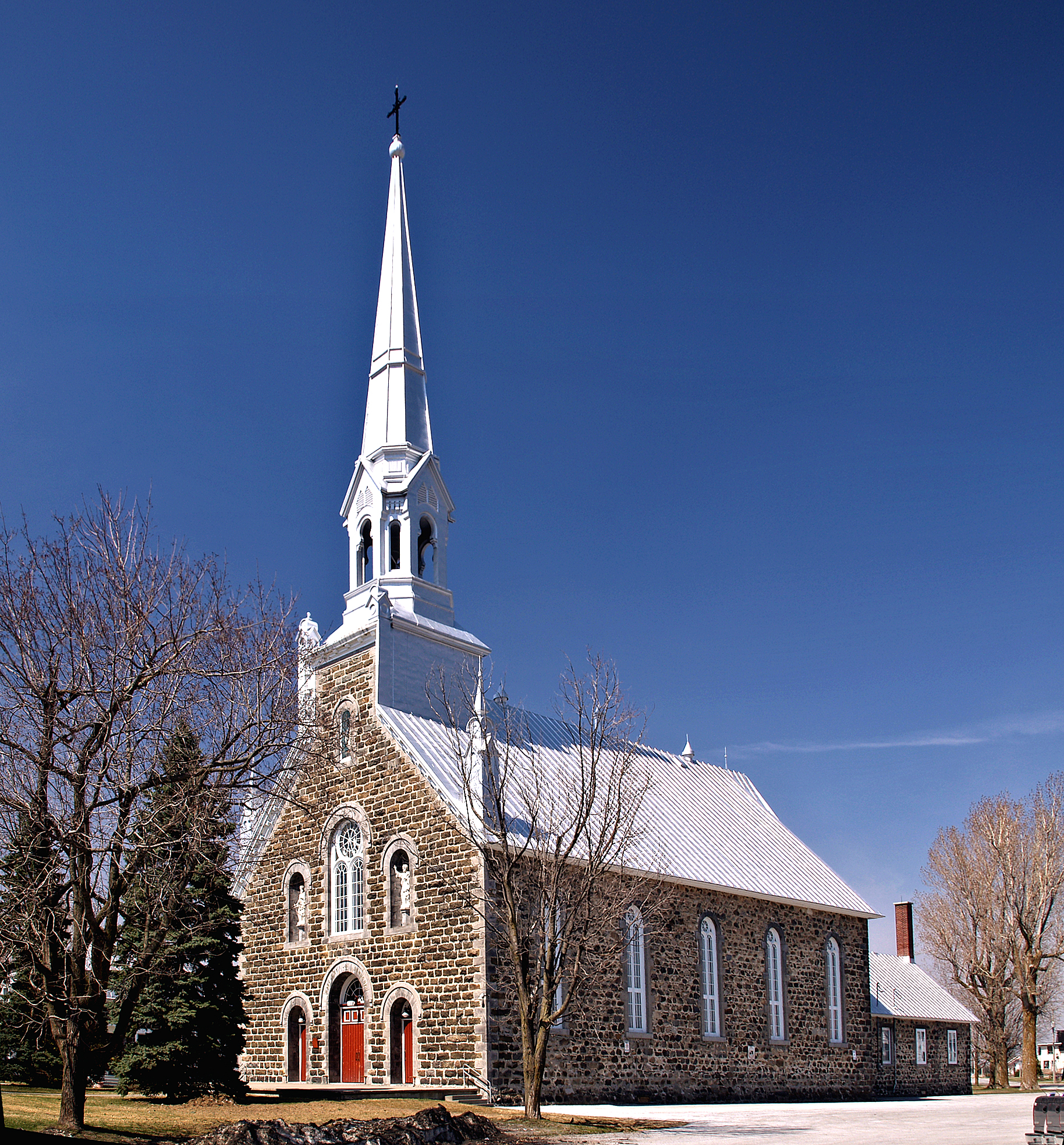 Notre-Dame-de-Stanbridge (Québec) - Eglise Notre-Dame des Anges